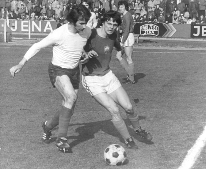 ADN-ZB-Liebers- -1.3.1975-schw-Bez.Gera: Im Fußball-Oberliga-Spiel FC Carl Zeiss Jena - BFC Dynamo (3:2) setzte sich in dieser Spielszene vor 10 000 Zuschauern Harald Irmscher (links) gegen Eigendorf durch.